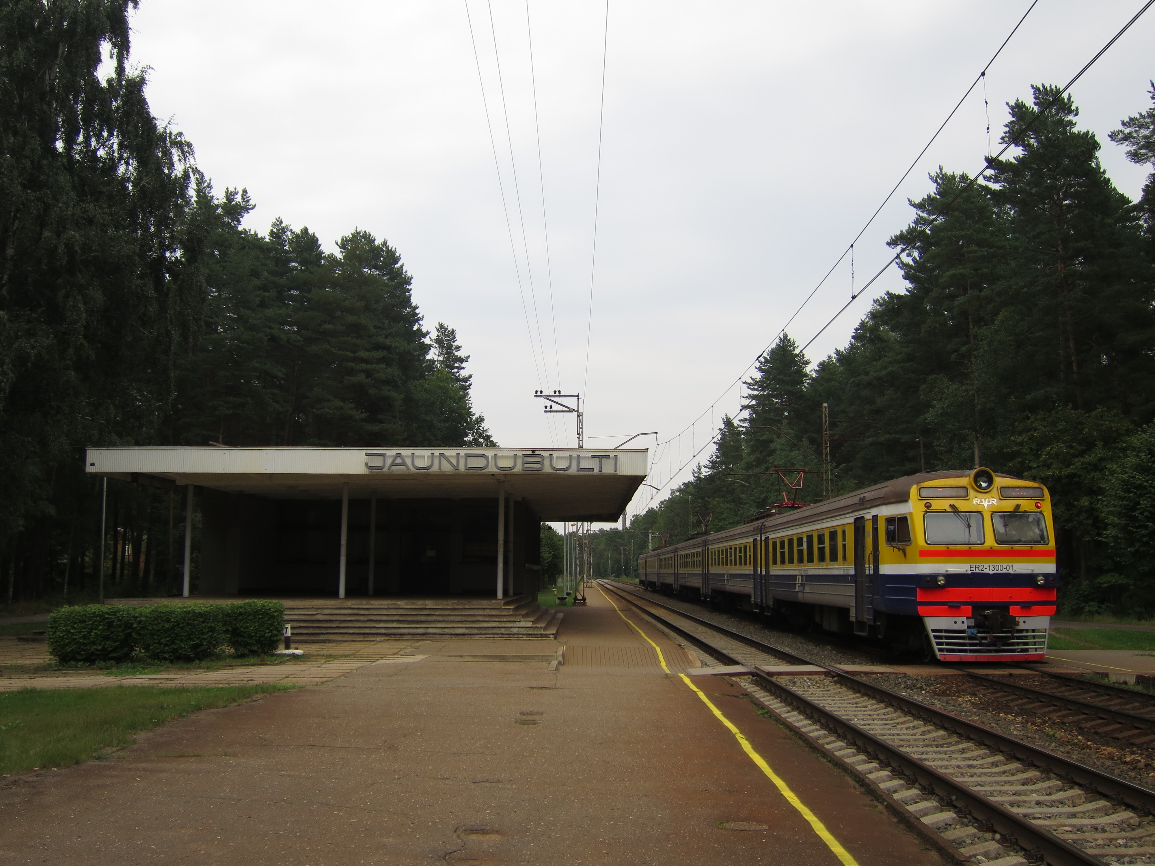 Jaundubultu stacija